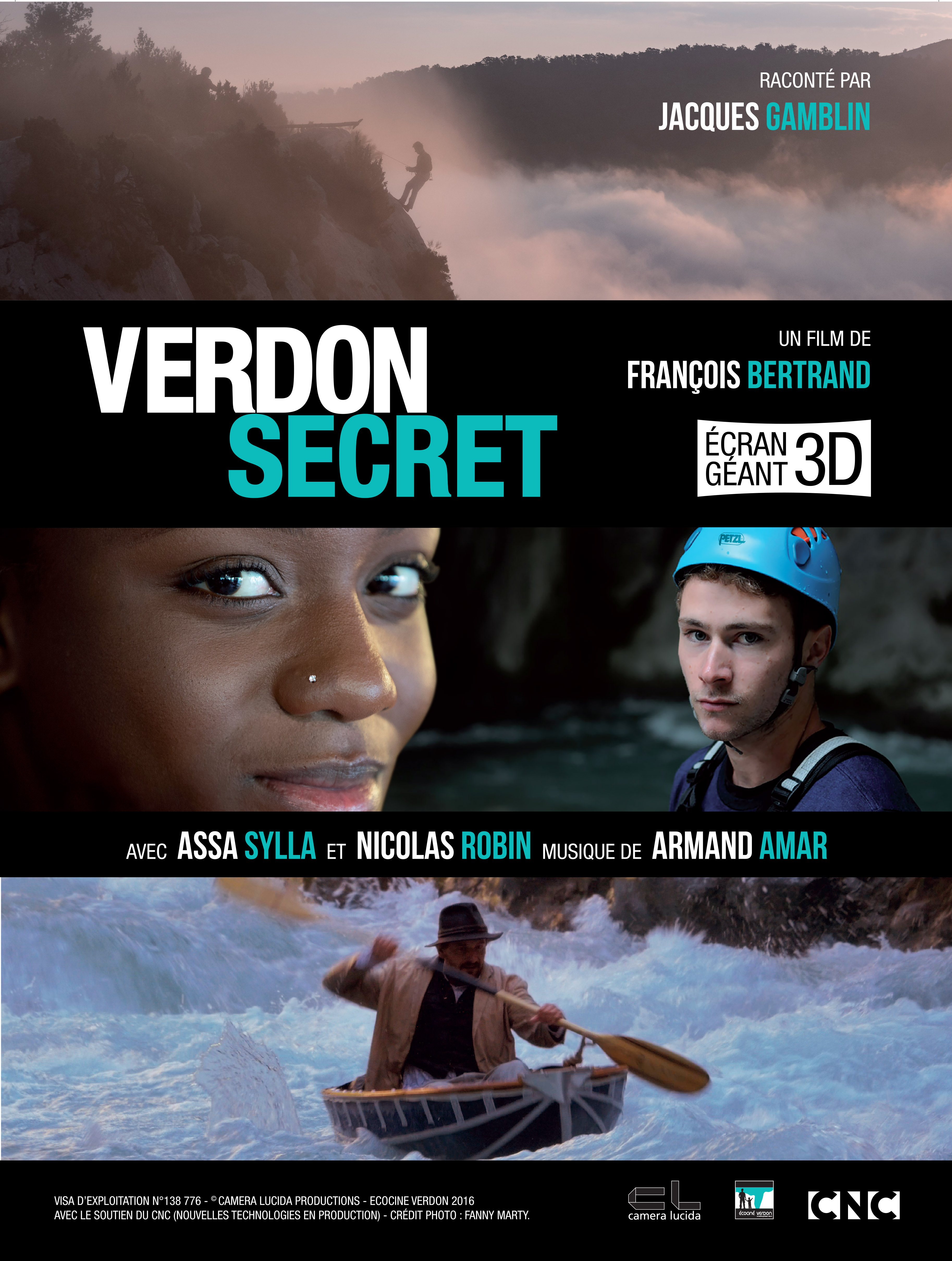 Affiche du film Verdon Secret